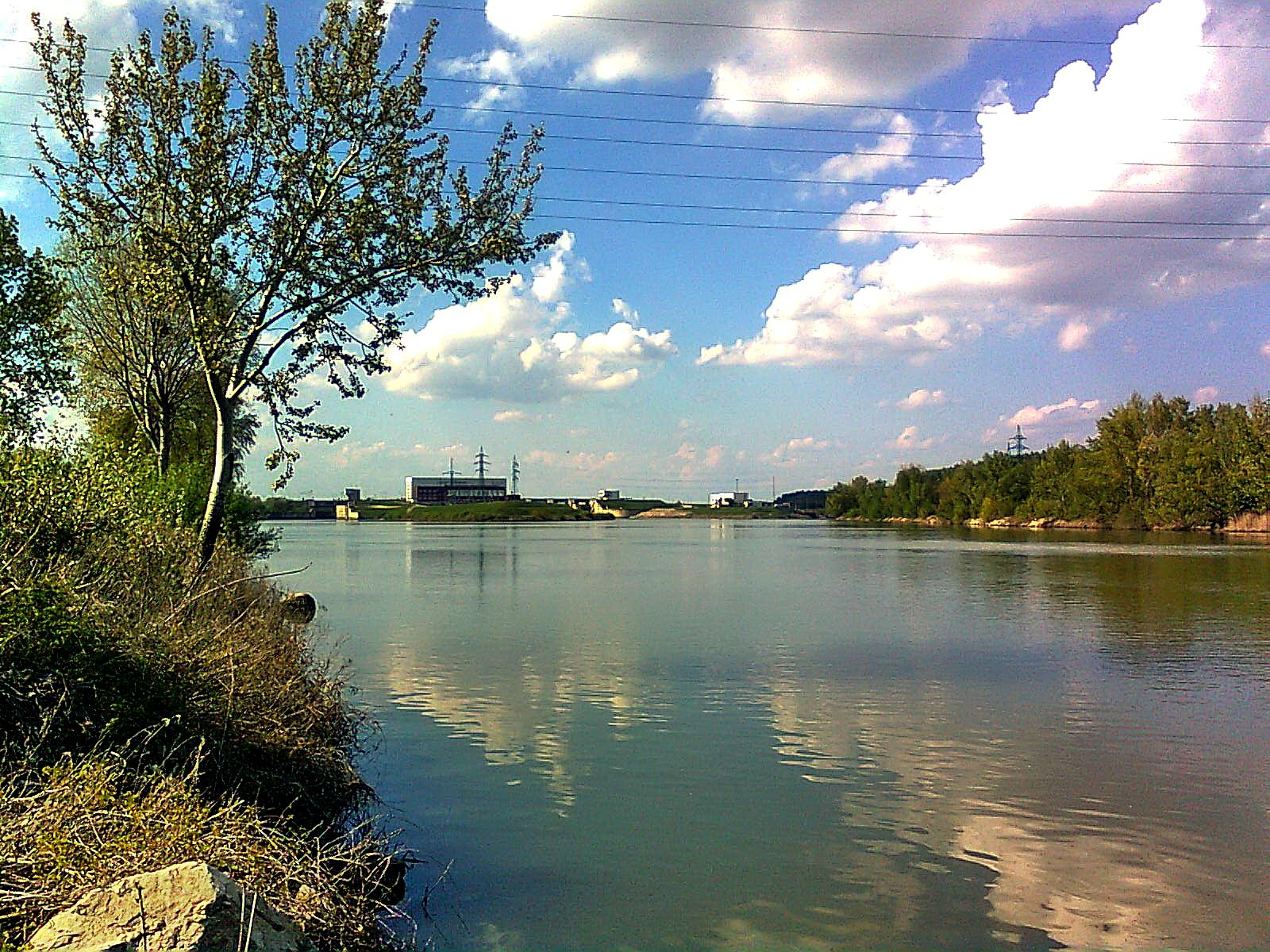 Šaľa Vodná nádrž Kráľová 2